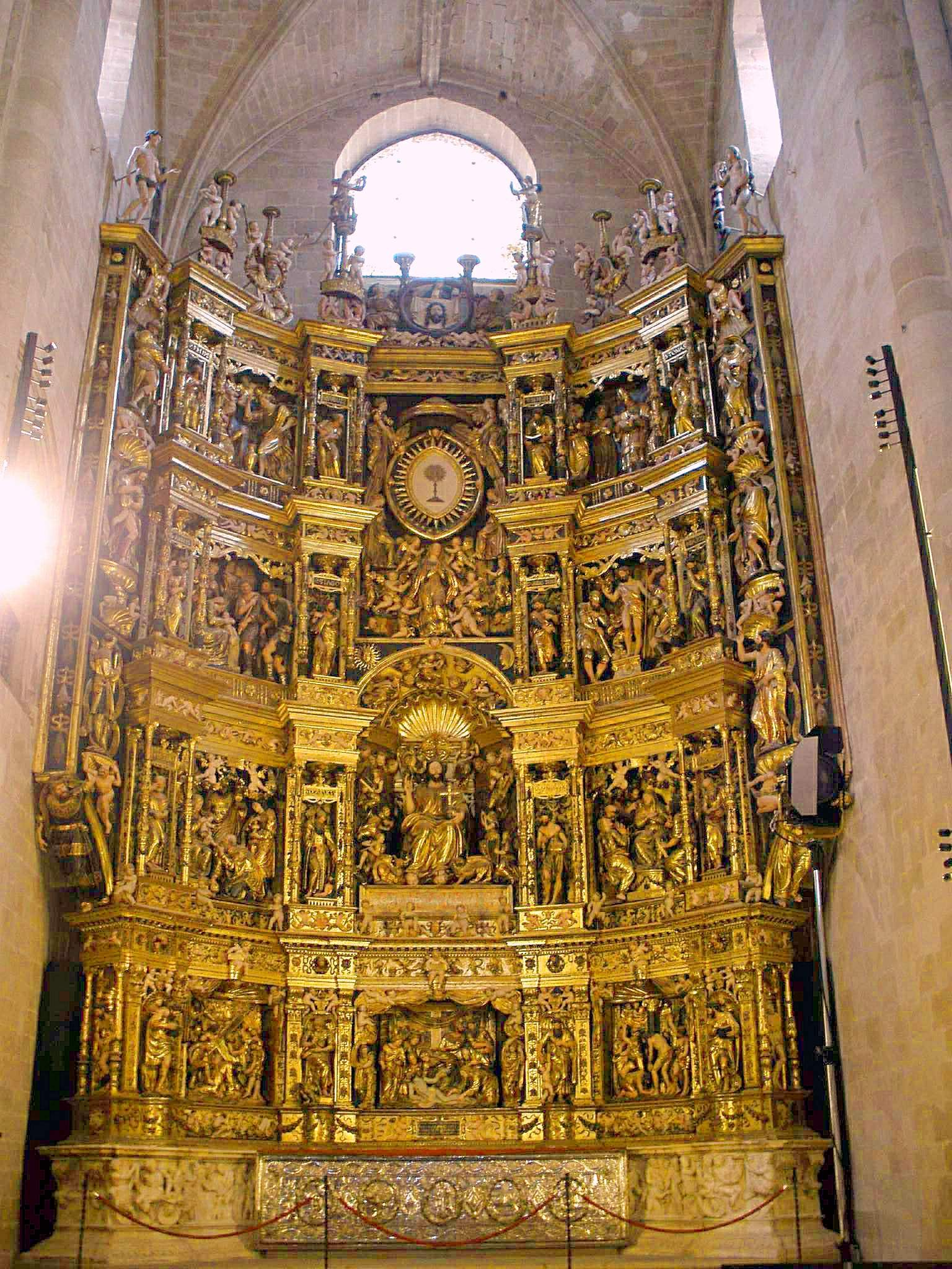 Concatedral del Salvador y Santa María, Santo Domingo de la Calzada (La Rioja). Retablo mayor de estilo renacentista plateresco, obra maestra de Damiá Forment